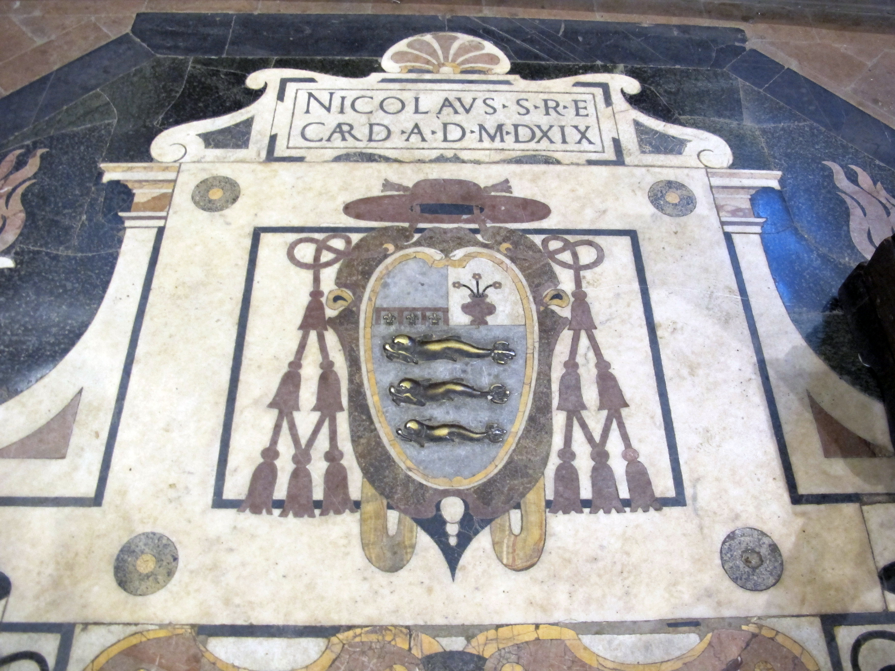 Cappella pandolfini, tomba pandolfini sul pavimento 08 niccolò pandolfini